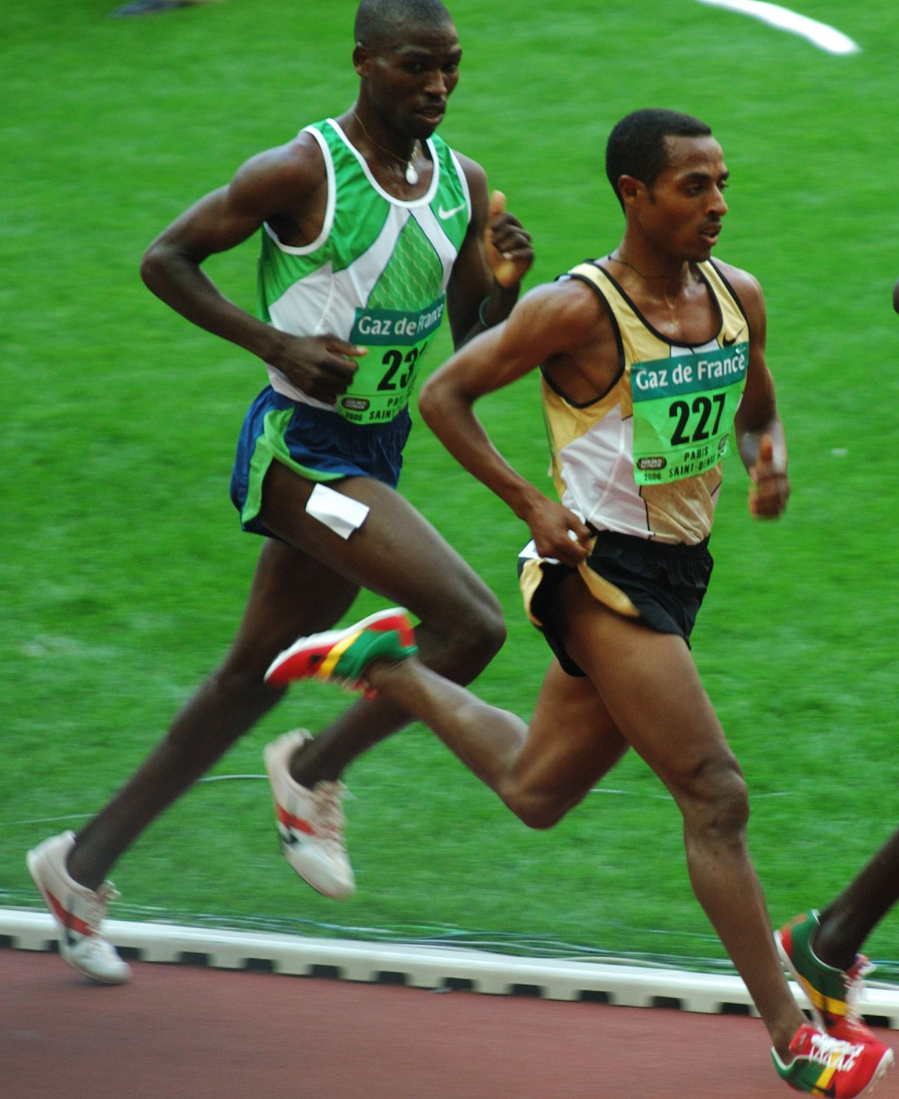 Kenenisa Bekele at Golden League 2006, Gaz de France, Paris Saint-Denis.